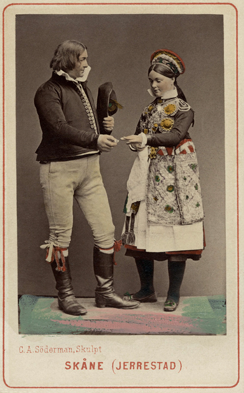 Dräktdockor med huvuden skulpterade av C A Söderman, visade på världsutställningen i Wien 1873. Man och kvinna i folkdräkter från Järrestad, Skåne. Handkolorerad.